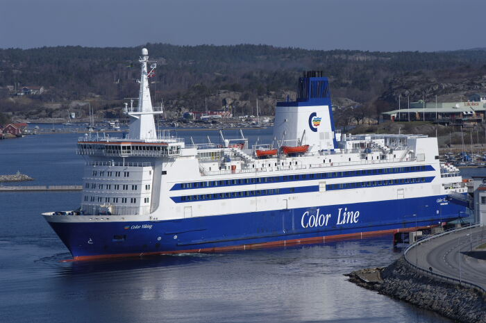 MS Color Viking leaving Strömstad